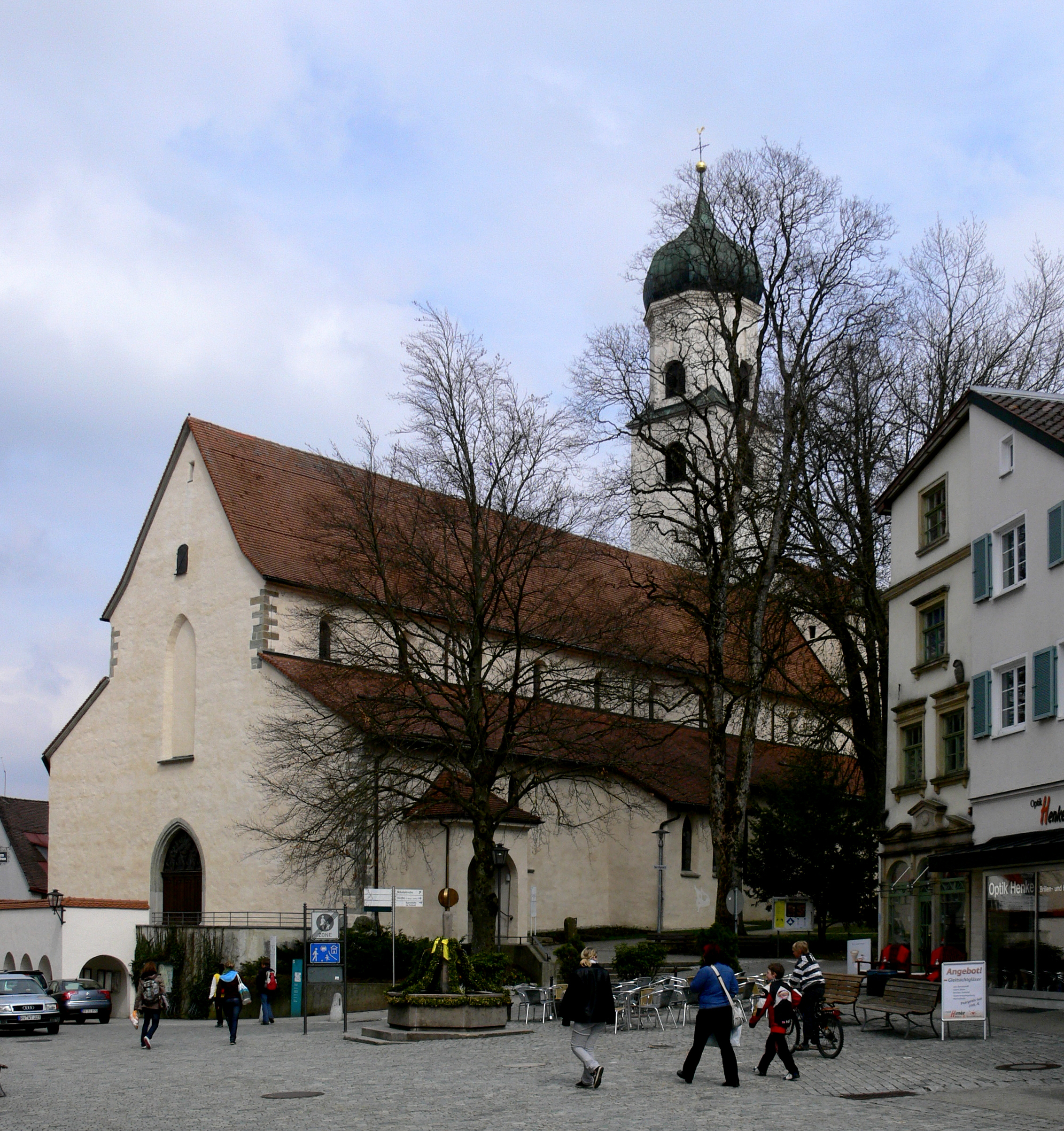 Isny im Allgäu, Nikolaikirche, Außenansicht